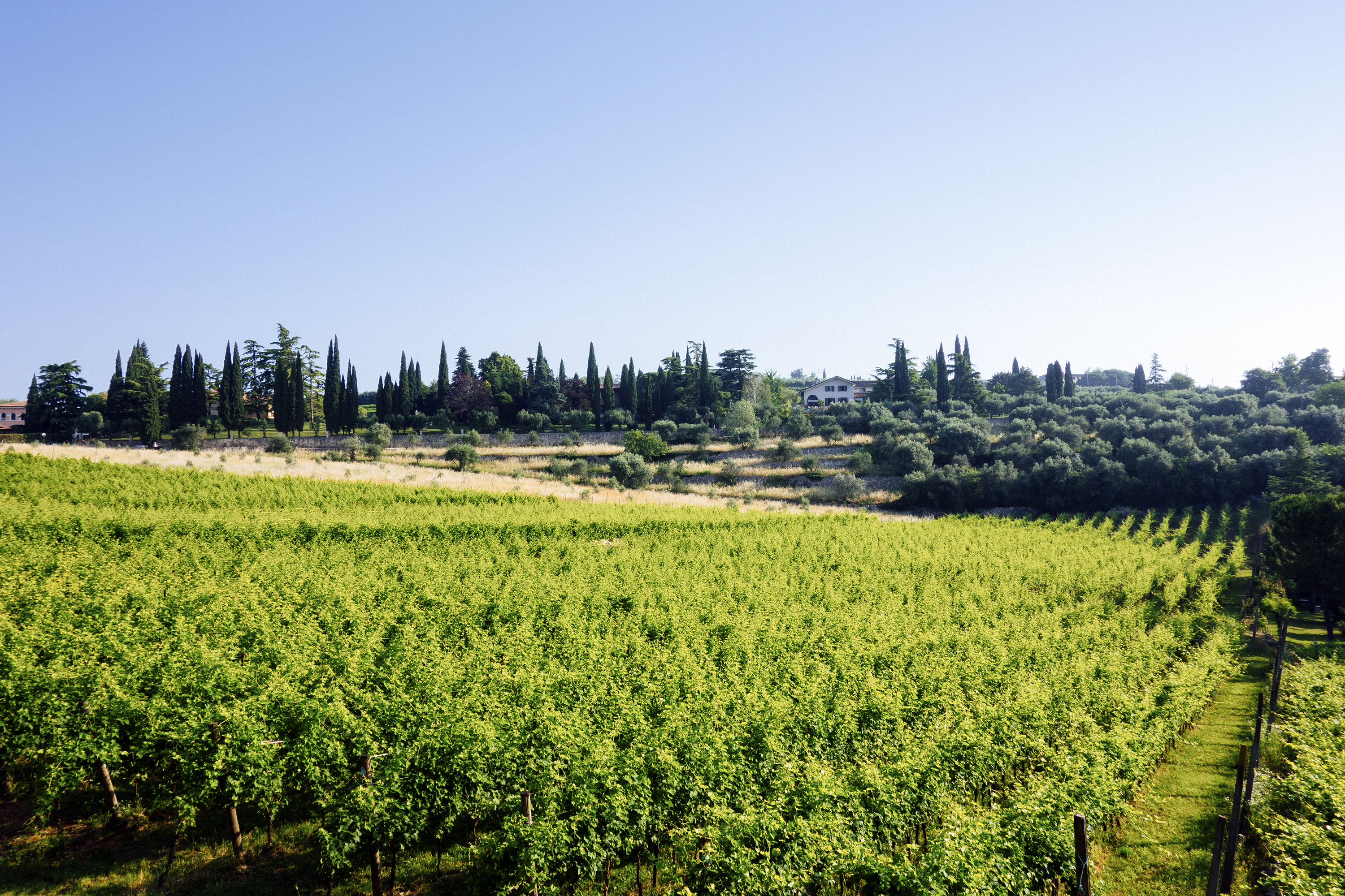 Le colline nel territorio del comune di Verona. In primo piano filari di viti, sullo sfondo terrazzamenti con coltivazioni di olivi.